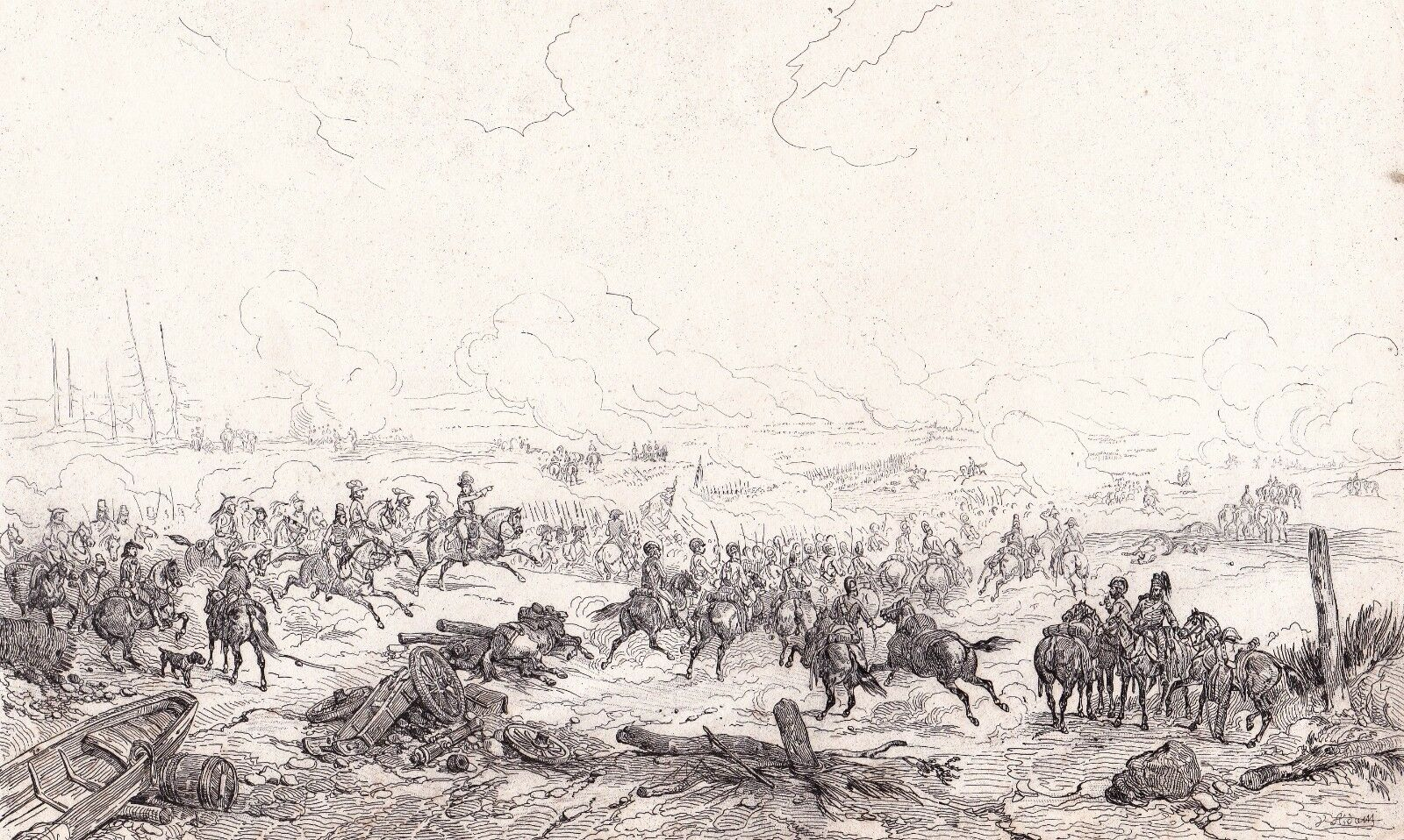 Bataille de Neuwied, 18 avril 1797. Les troupes françaises du général Hoche battent une armée autrichienne commandée par le général Werneck.